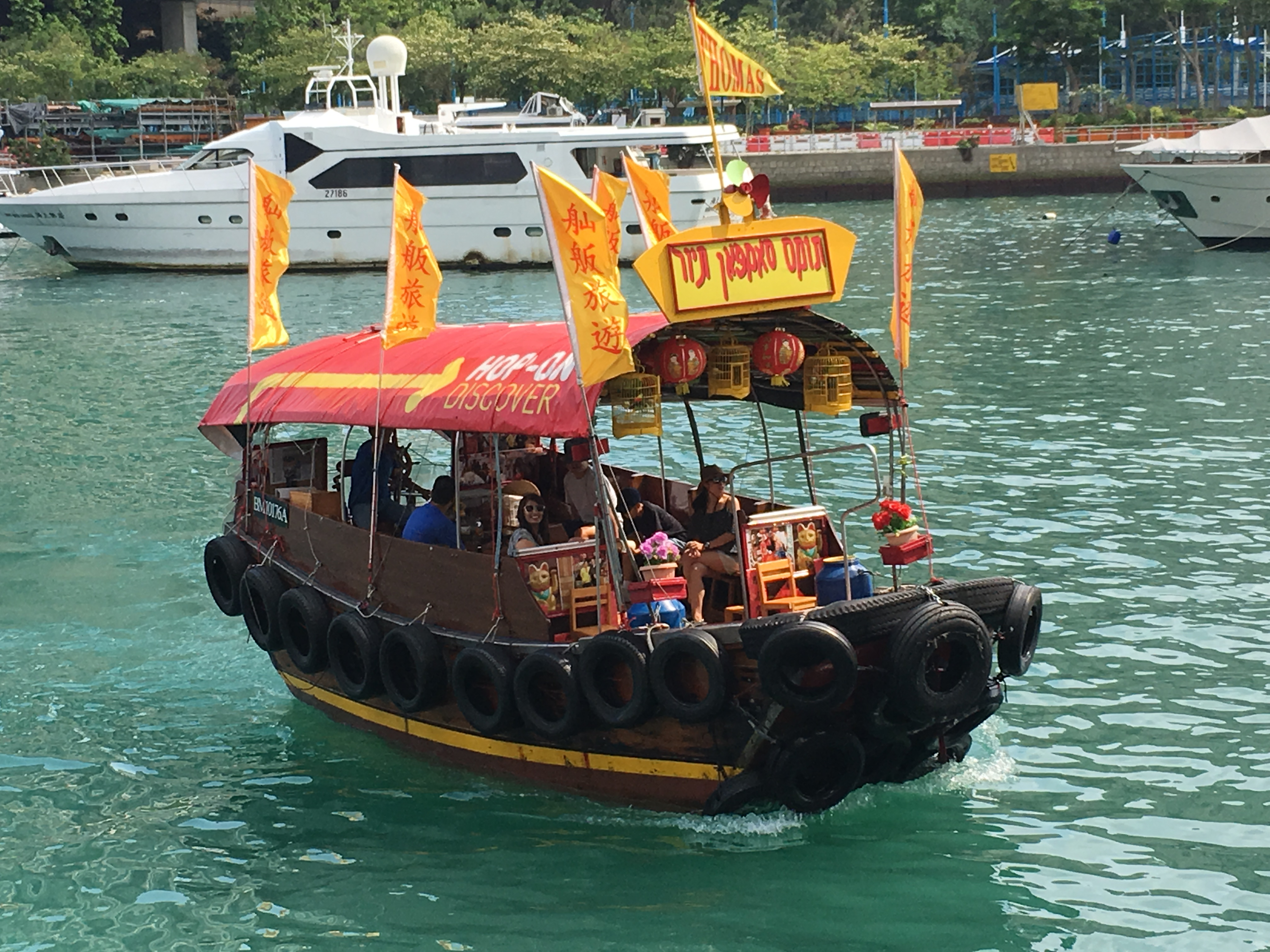 中文（香港）: This photo is taken in Aberdeen.